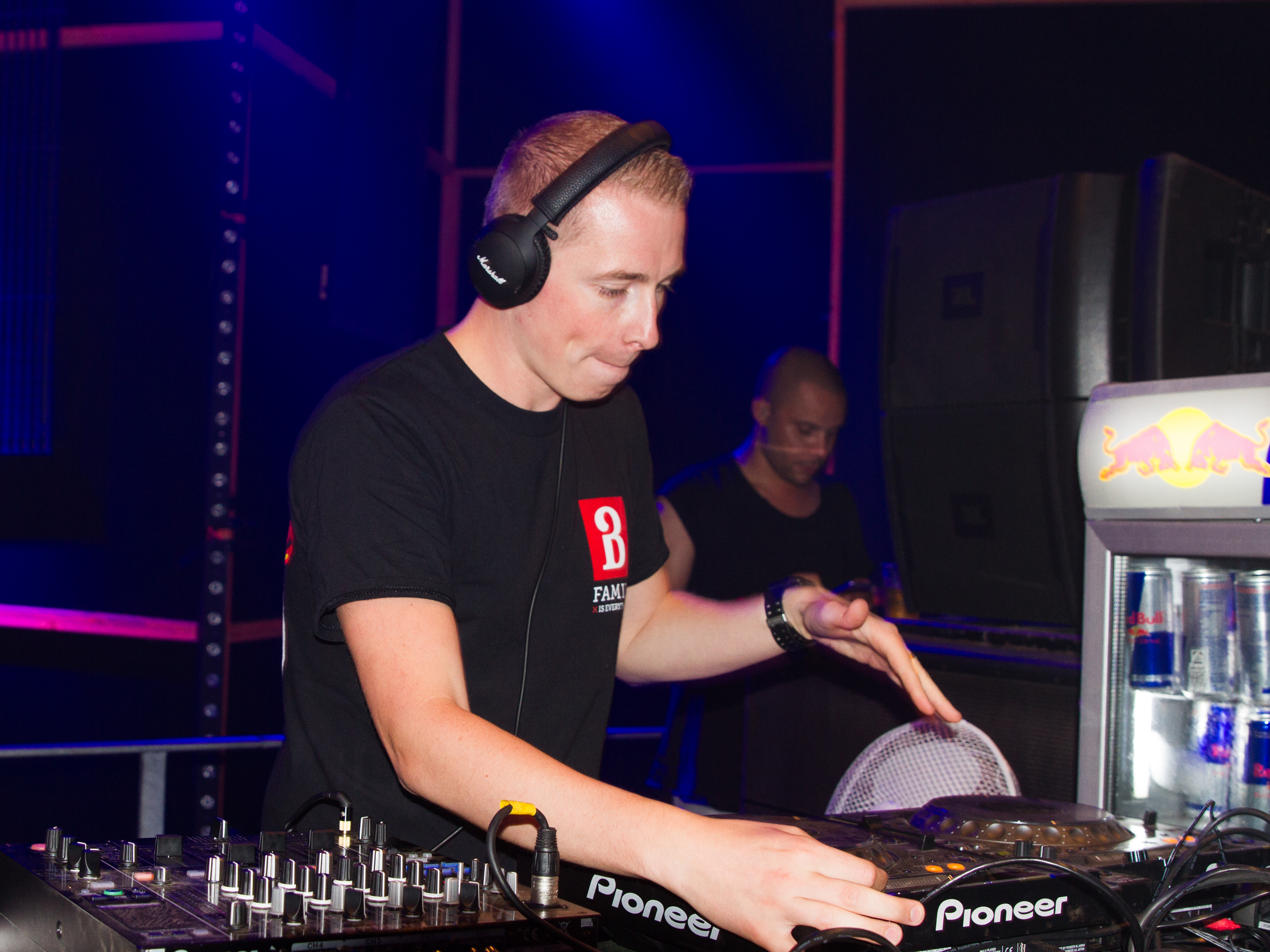 DJ Coone (Koen Bauweraerts) beim 14. Airbeat-One Dance Festivals das vom 16. bis 19. Juli 2015 auf dem Flugplatz Neustadt-Glewe stattfand.